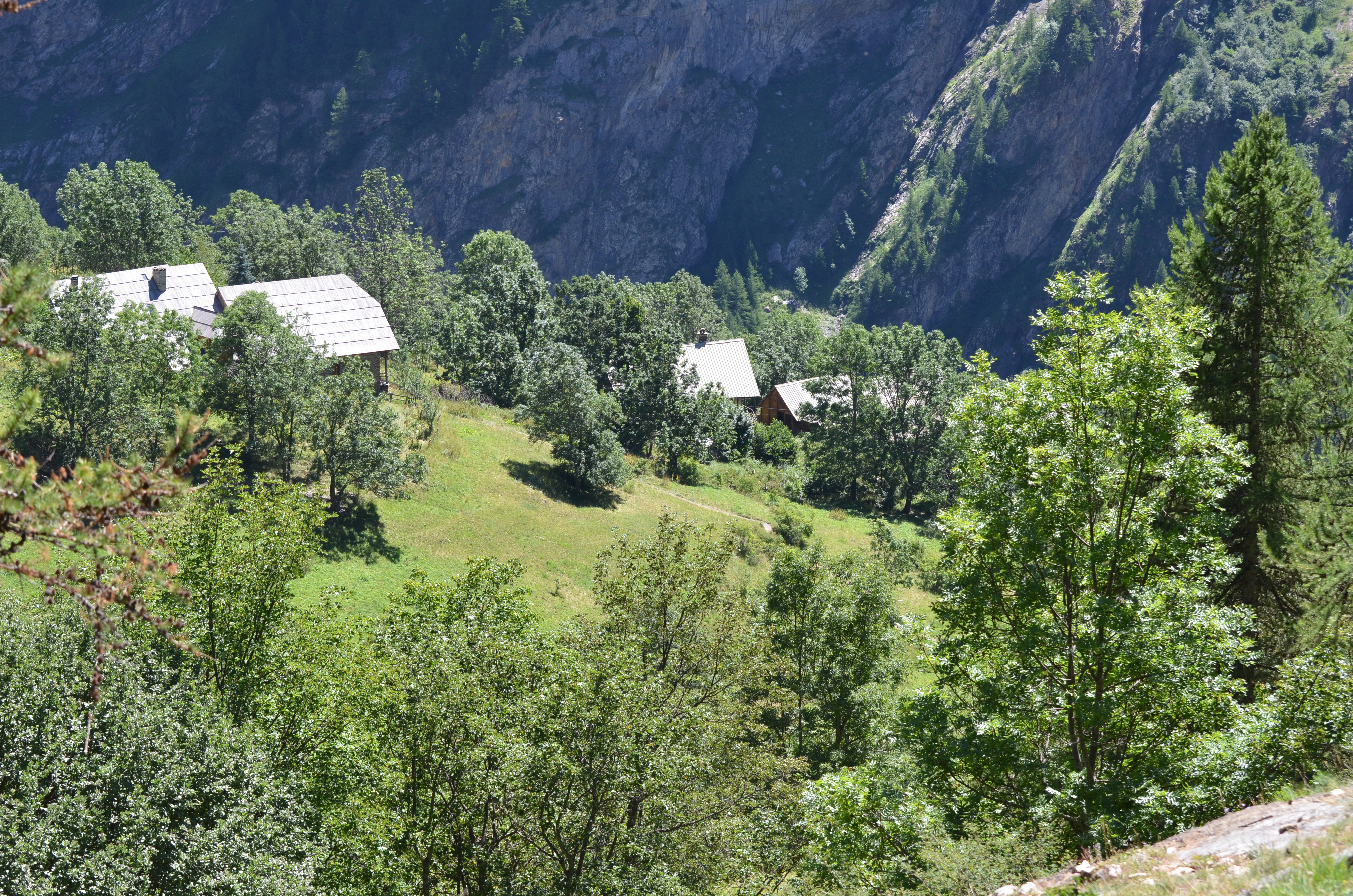 Quartier de Romans à Dormillouse (Hautes-Alpes)